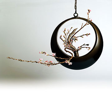 華道遠州スタジオにて宗家、芦田一寿が作成した月光筒生けの彼岸桜の古典生花。 独特の撓めの技術により上旬のいけばなの姿をとっている。「観世流し」くさび撓(た)めという技術でまっすぐな枝に曲線を与え、画像のように観世水「水の流れ」「水流」「雲の流れ・霞」などを表現する。むろん、そのまま葉や花・実をつけたまま枝は毛細管現象によって水を吸い上げていく。